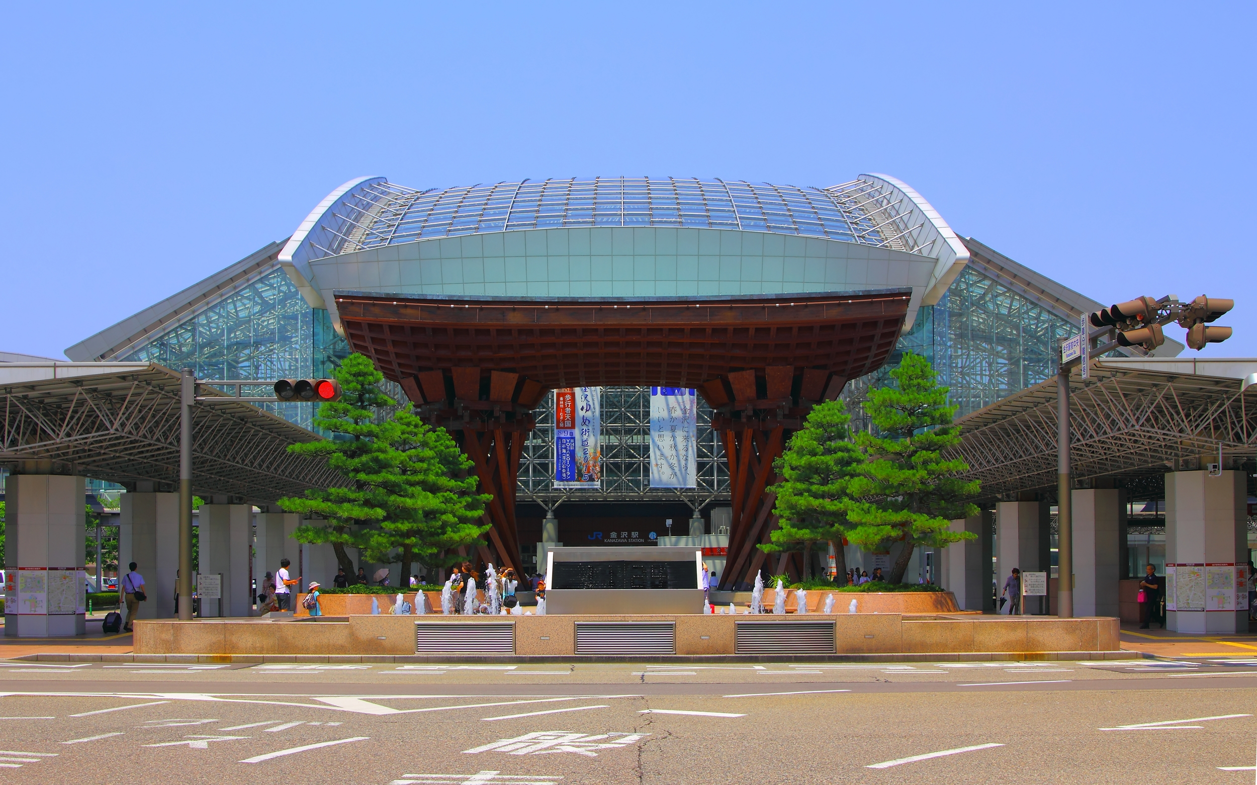 金沢駅、兼六園口。鼓門・もてなしドーム。